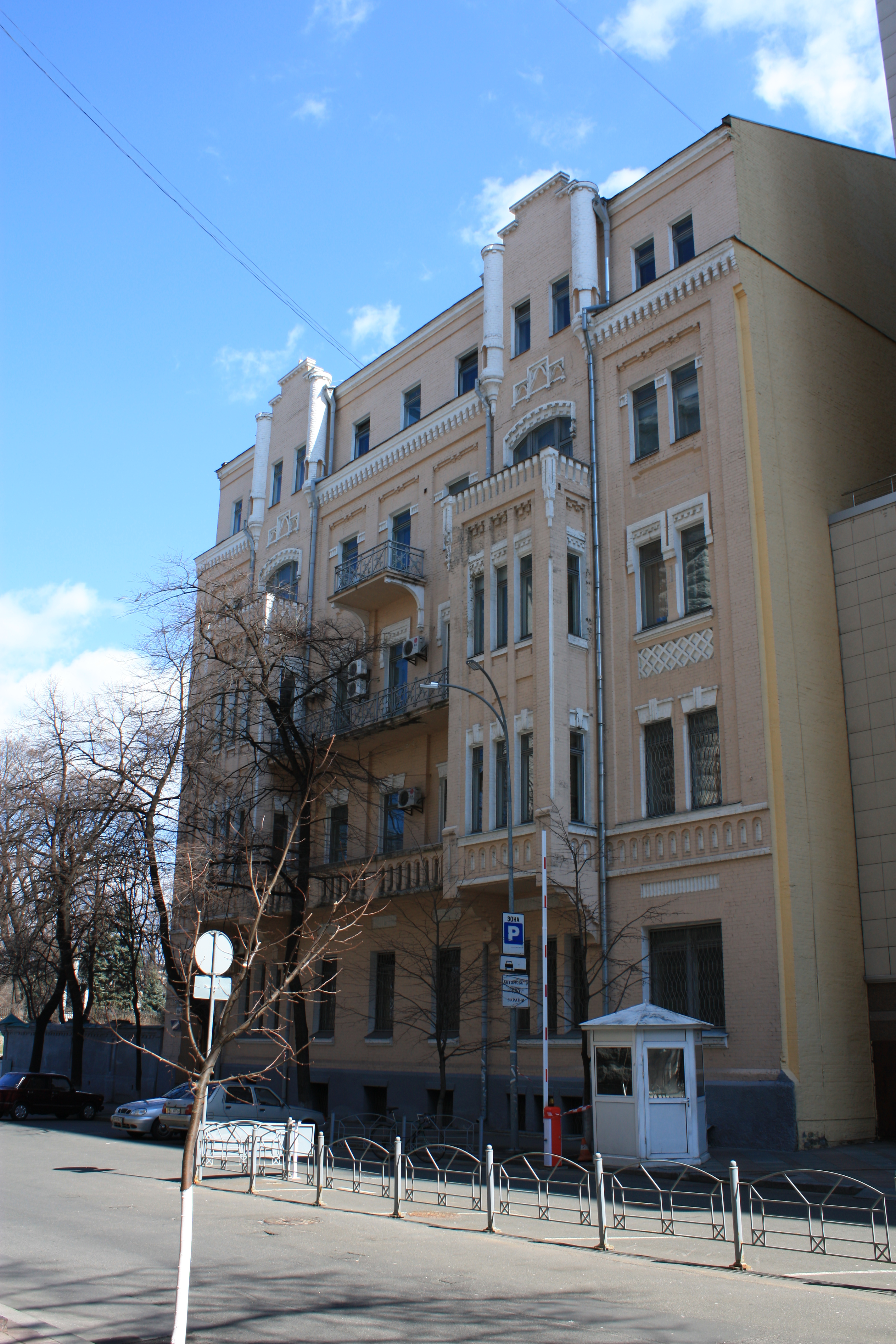 Будинок прибутковий, в якому мешкав Драй-Хмара М. О., поет, Київ, Садова вул., 1/14